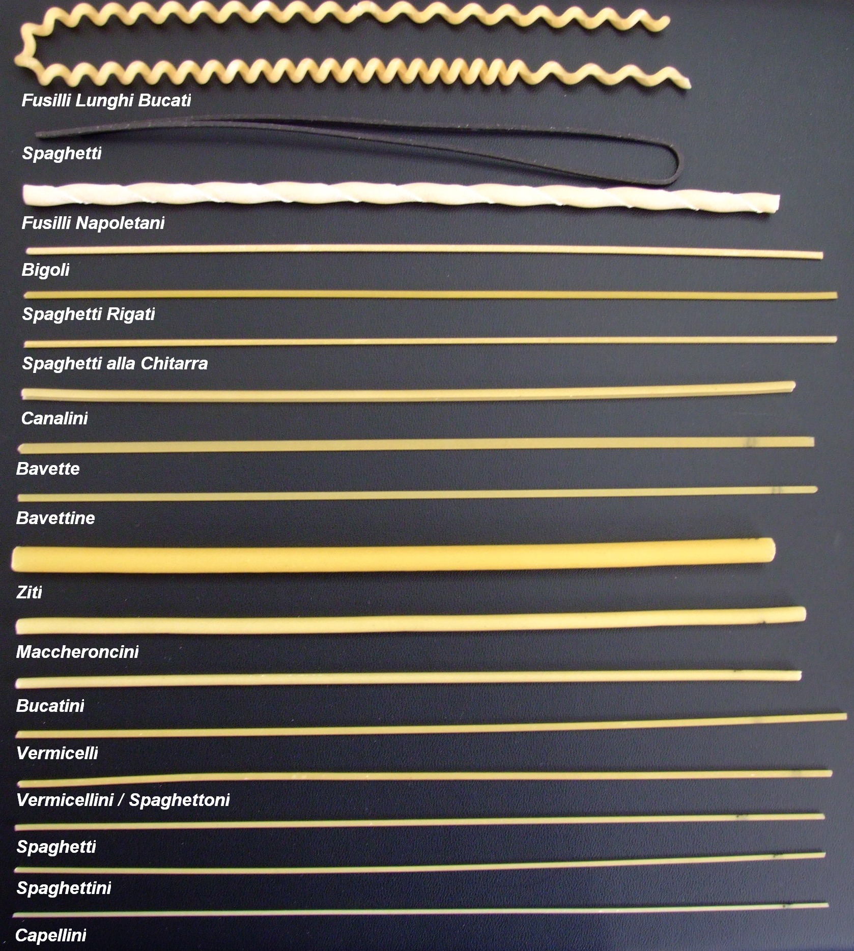 Quelle: selbst fotografiert, 11/2006 Fotograf: Späth Chr.